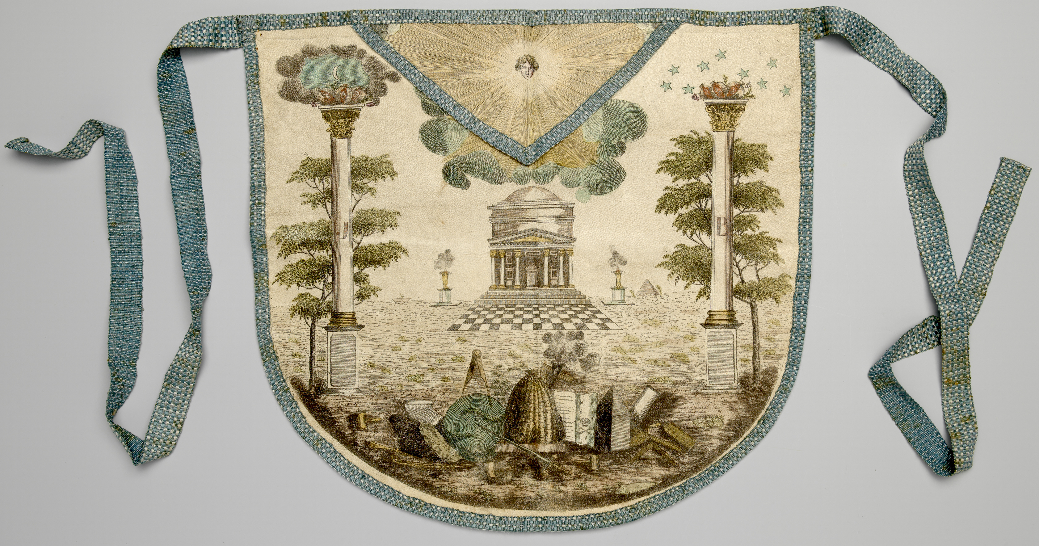 Predpasnik mojstra.